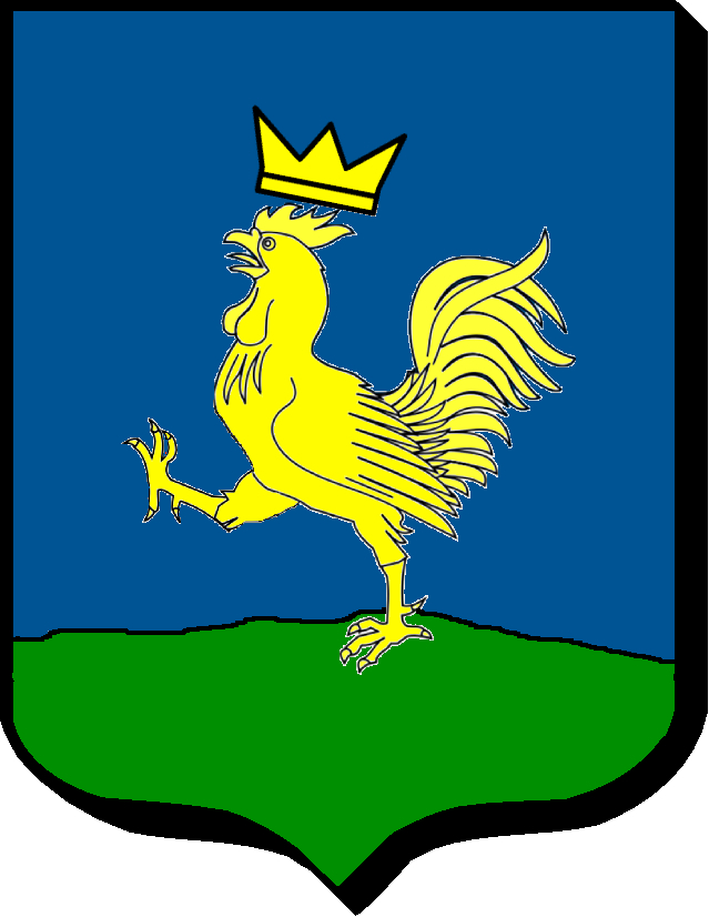 d'azur, au coq hardi, crêté, barbé, membré et couronné d'or, posé sur une terrasse de sinople.